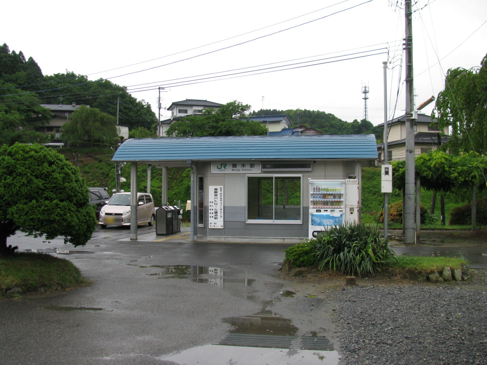 磐越東線舞木駅